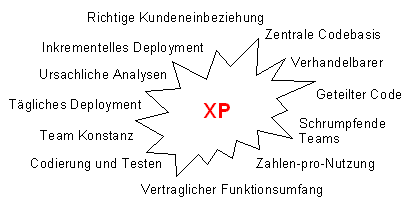 XP-Evolution-Nebenpraktiken